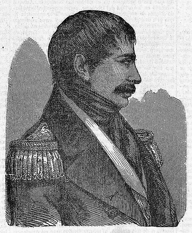 Retrato de Jean-Baptiste de Laclos. Escritor francés (1789-1870)